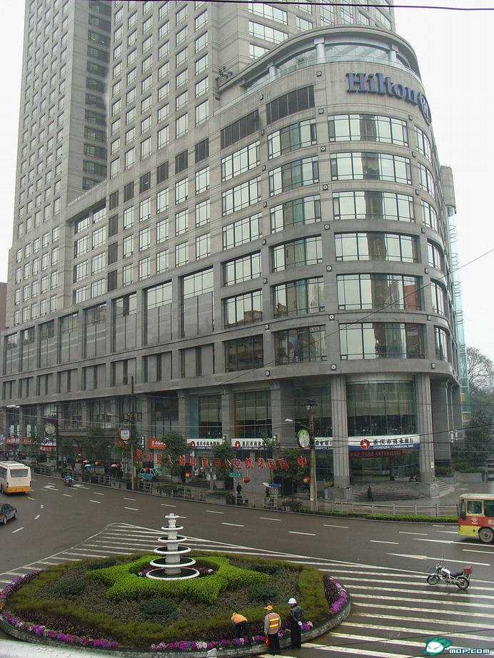 HILTON HOTEL Chongqing P.R.C